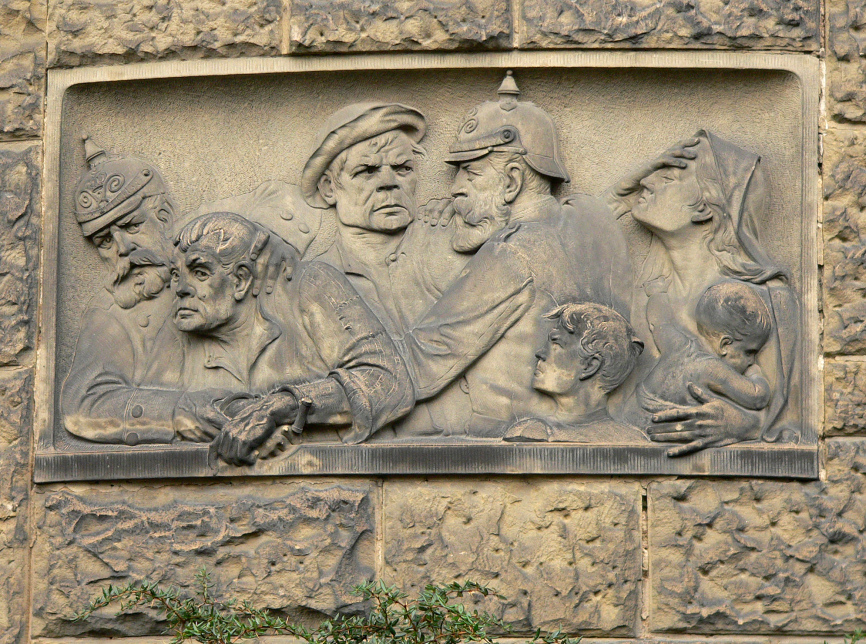 Darstellung Polizei im Kampf gegen das Verbrechertum an der Fassade der Polizeidirektion Hannover